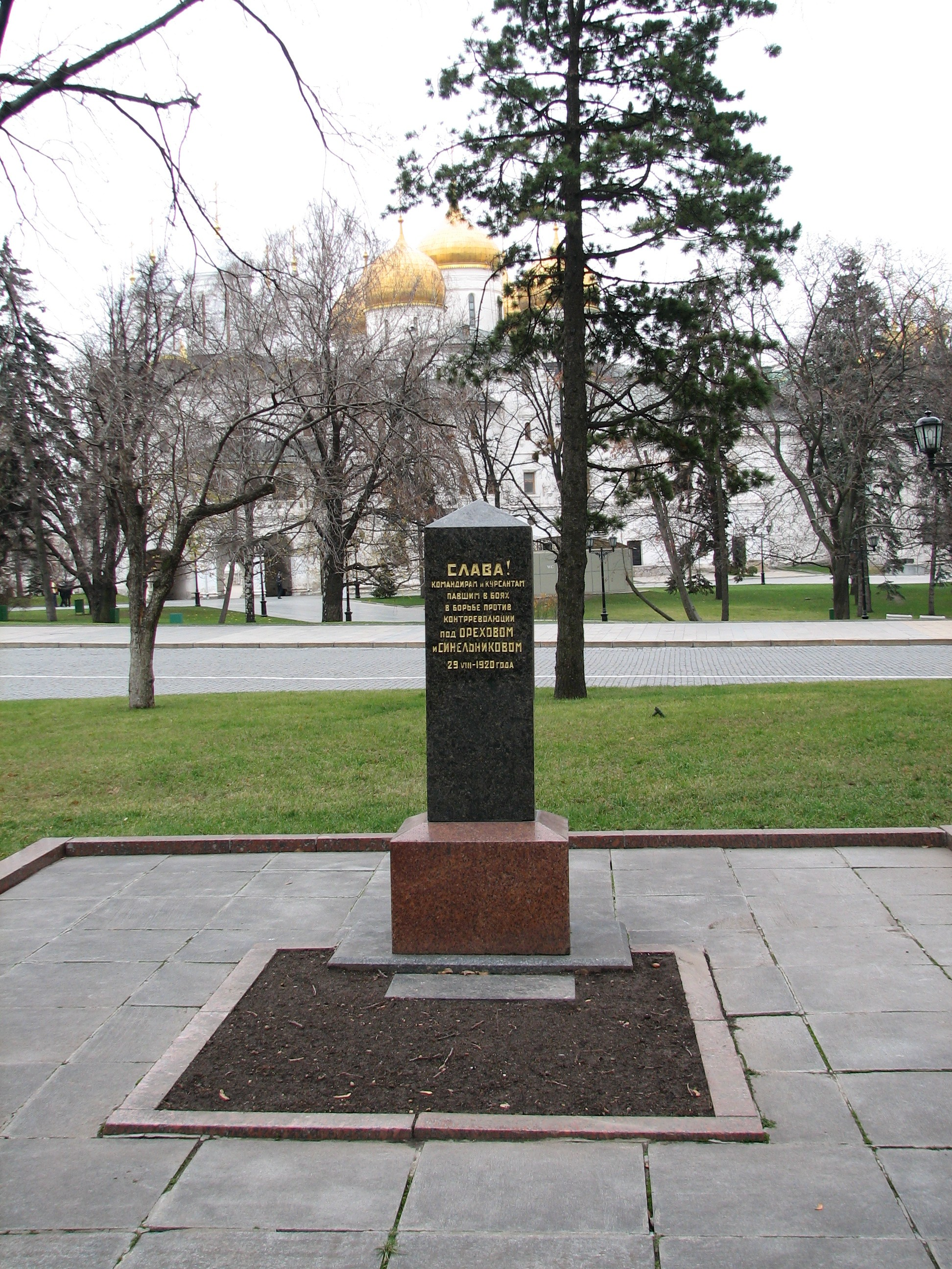 Памятник курсантам и командирам Школы ВЦиК в Кремле